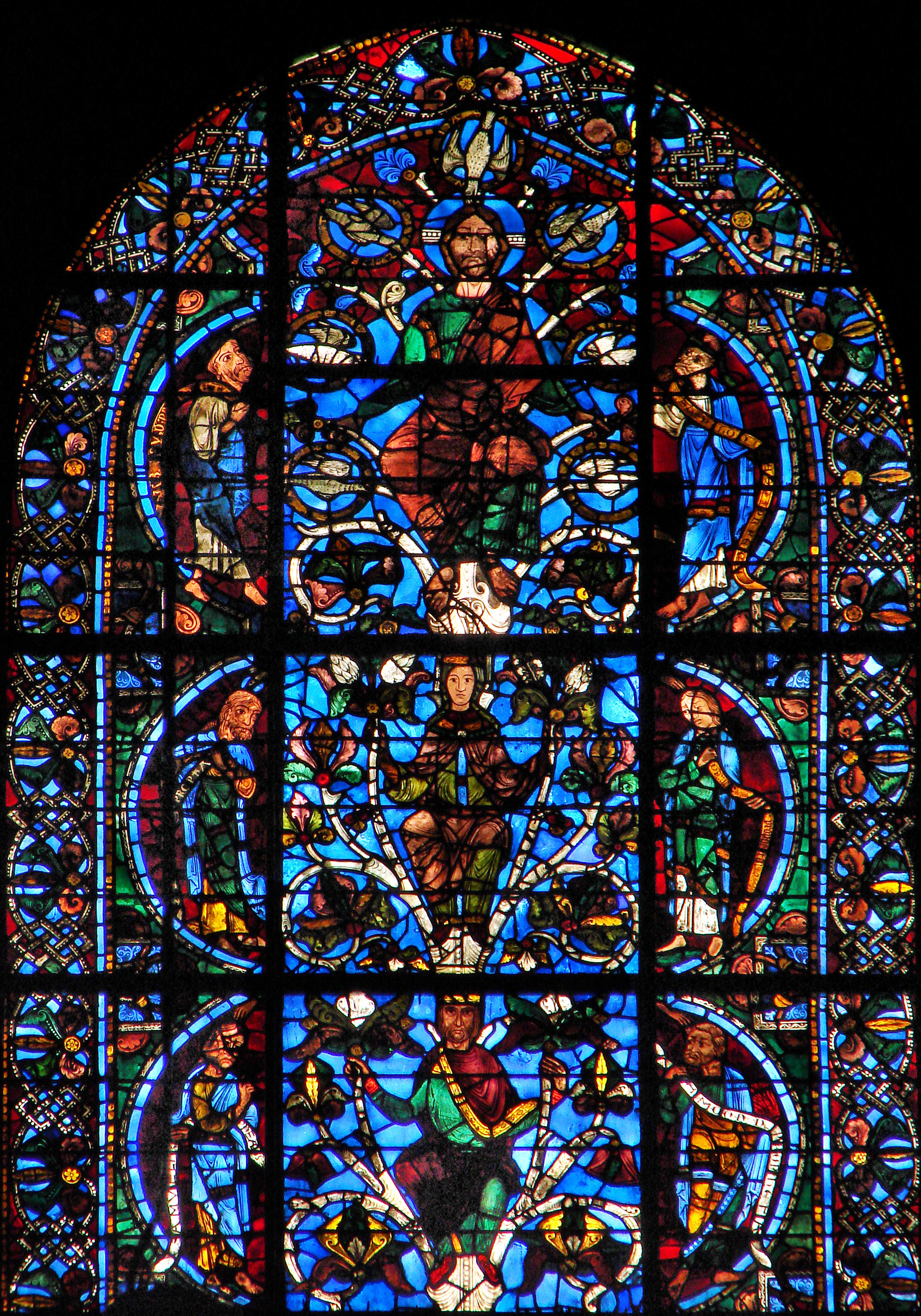 Détail d'un vitrail de la cathédrale Notre-Dame de Chartres (façade):l'arbre de Jessé . Upper section of the Jesse Tree Window